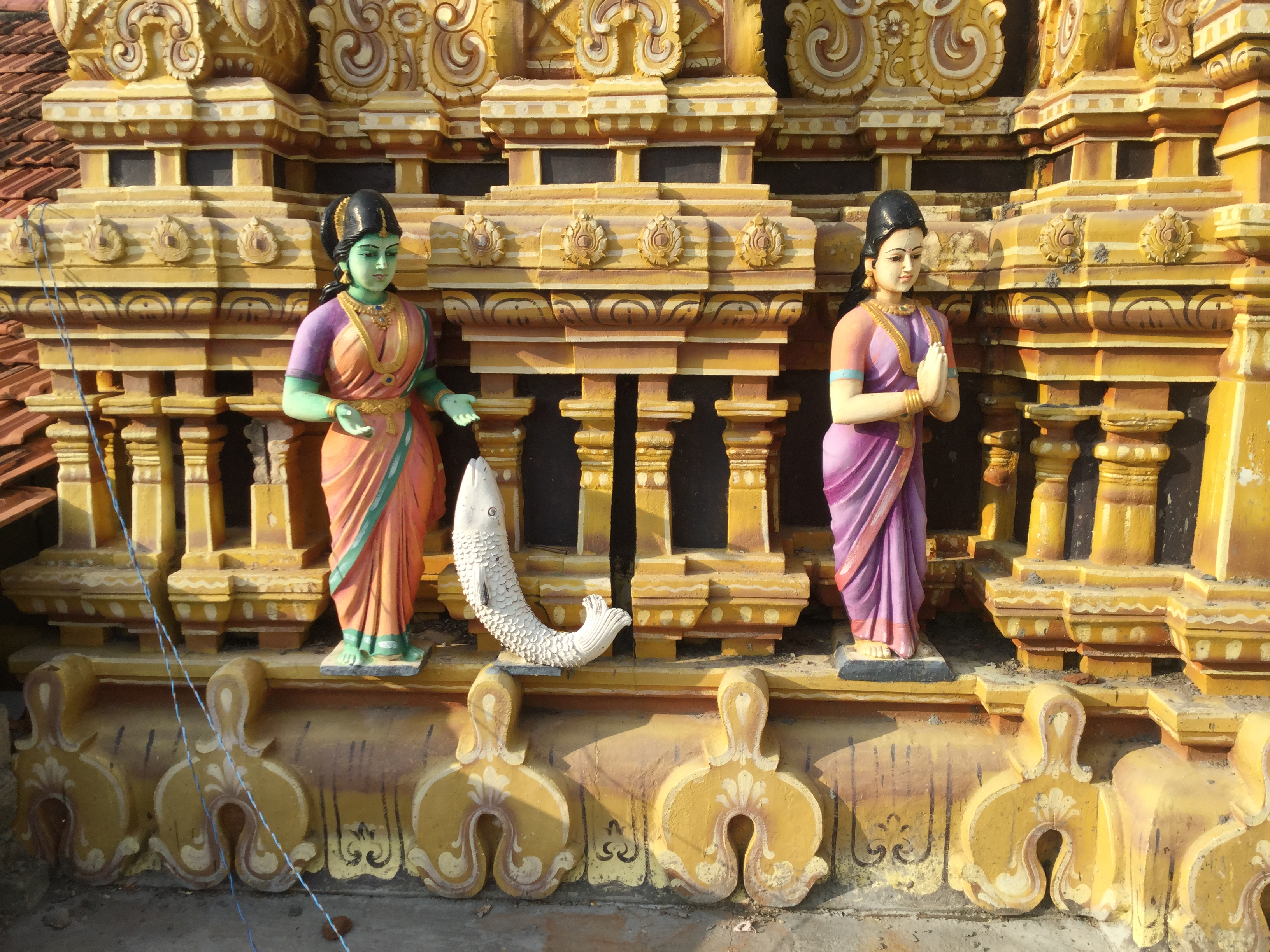 வழிநாச்சியின் மடியில் தவழும் மாயவன்